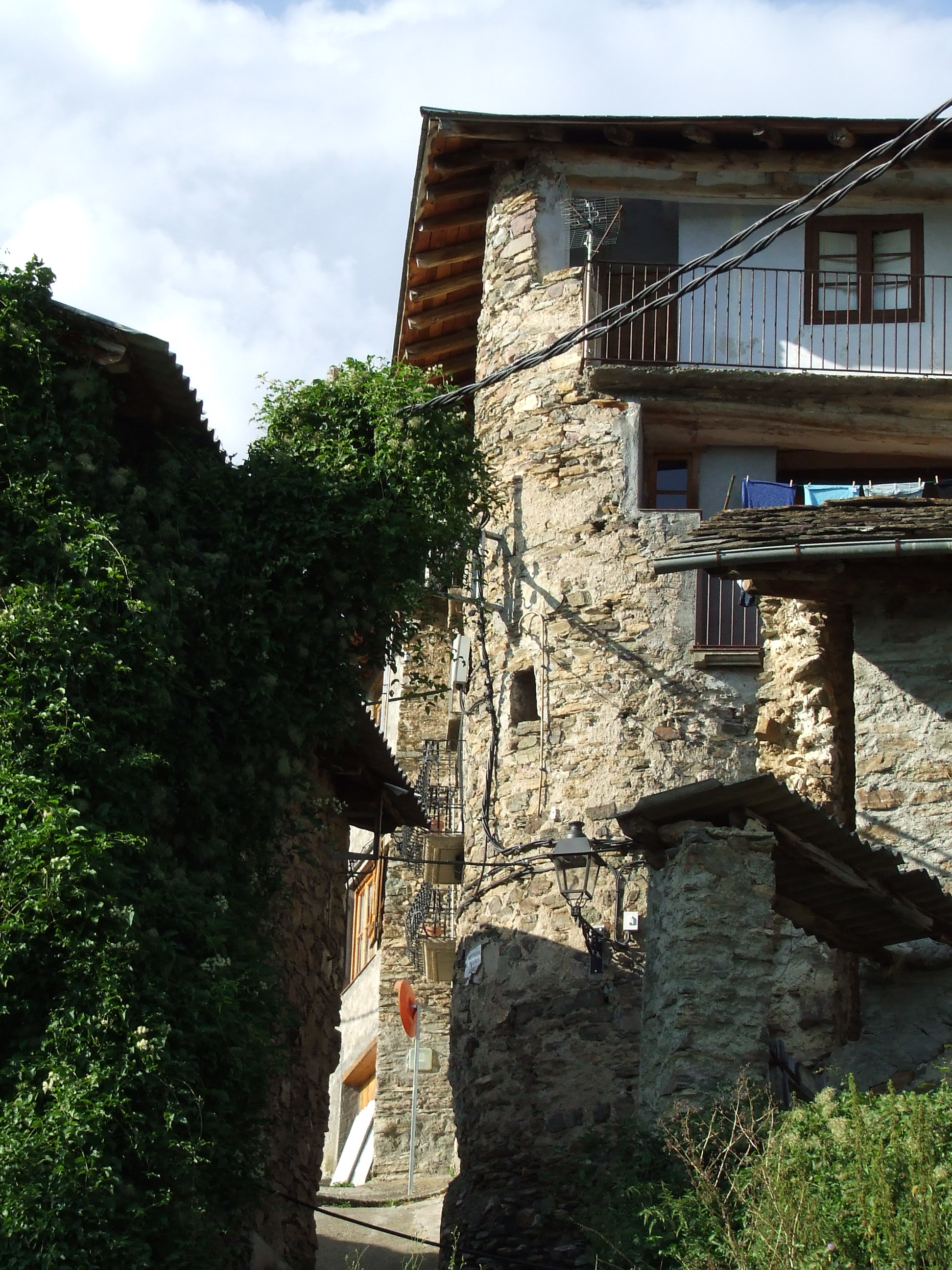 Torre de la murada de Mont-ros (la Torre de Cabdella, Pallars Jussà)